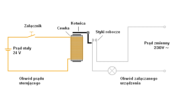 Zasada działania przekaźnika